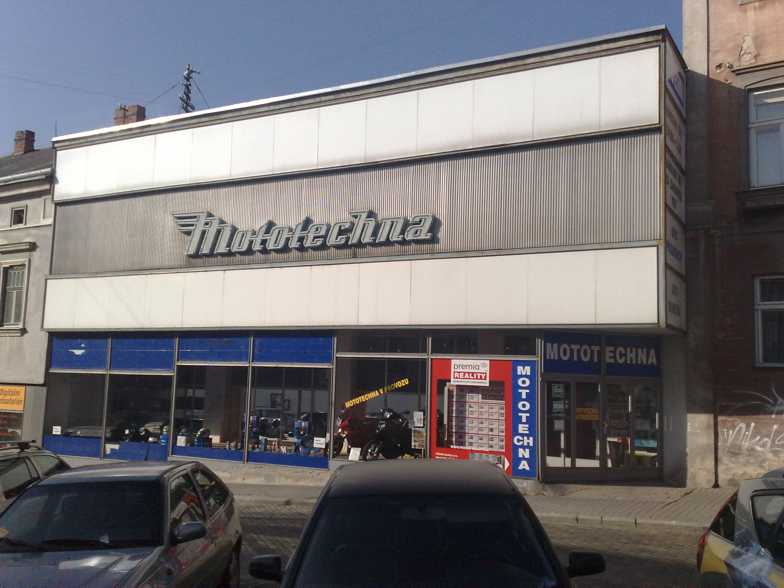 Fotografie pořízená ve Znojmě.